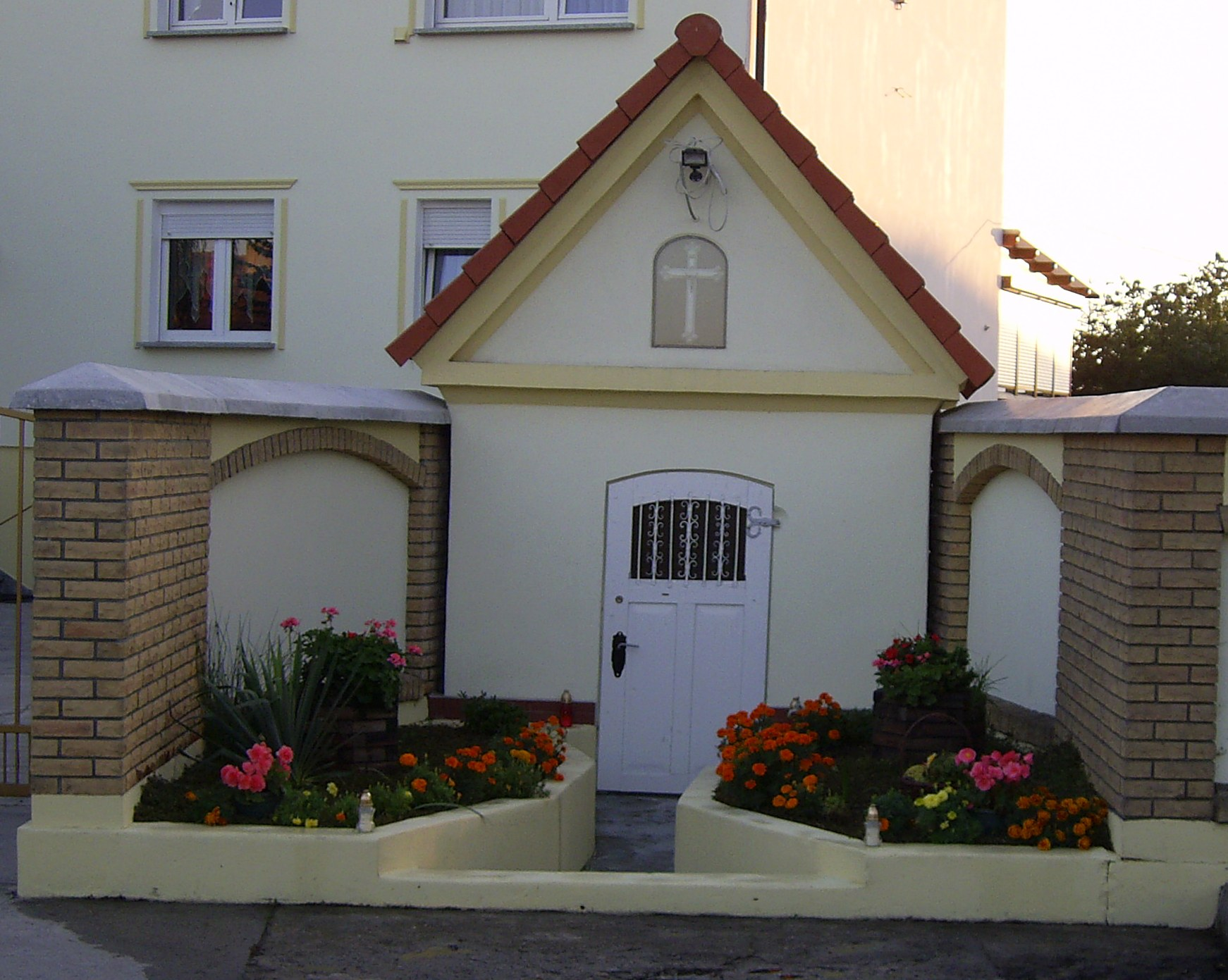 Kaplica w Święciechowie.